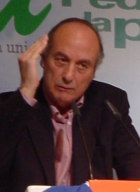 Paco Frutos en la sede de Izquierda Unida el 2005.